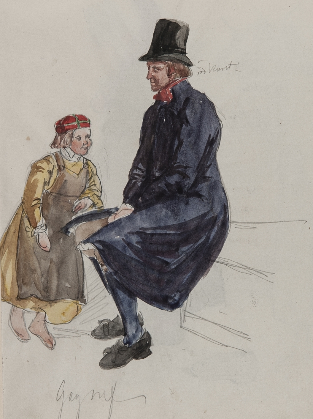 Akvarellerad handteckning. Mans- och pojkdräkt från Gagnef, Dalarna. Okänd konstnär - JW Wallander? NMA.0068975.